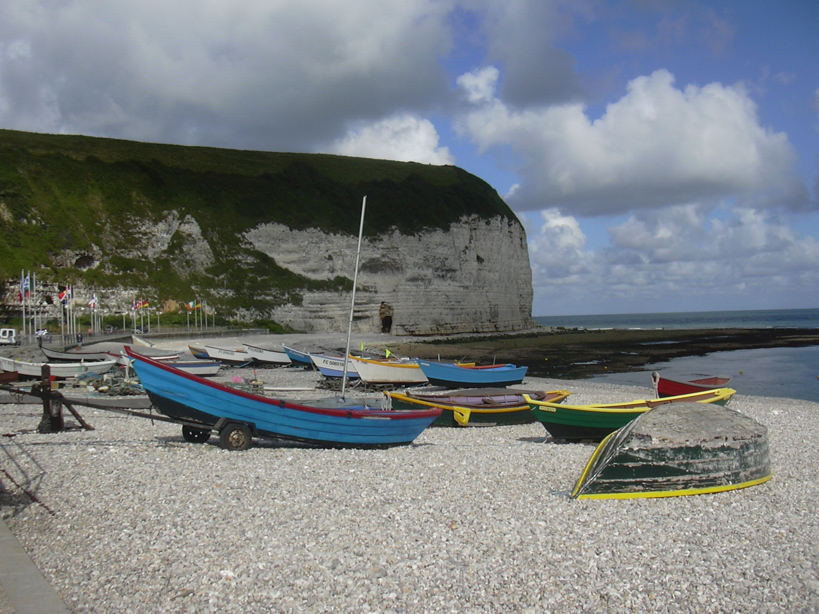 Yport, Falaise d'Aval, Normandie/France